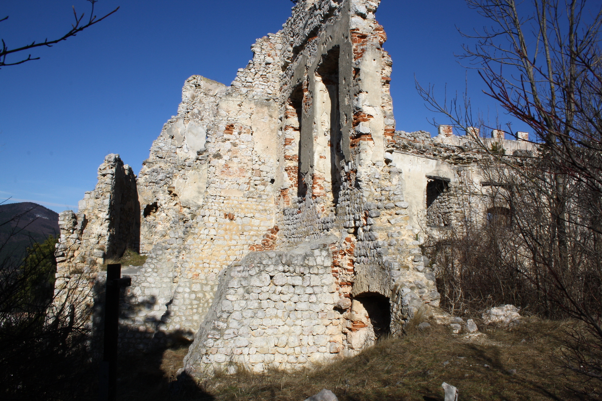 Die westliche Bereich der Burg Burgruine Starhemberg, Richtung Norden gesehen.